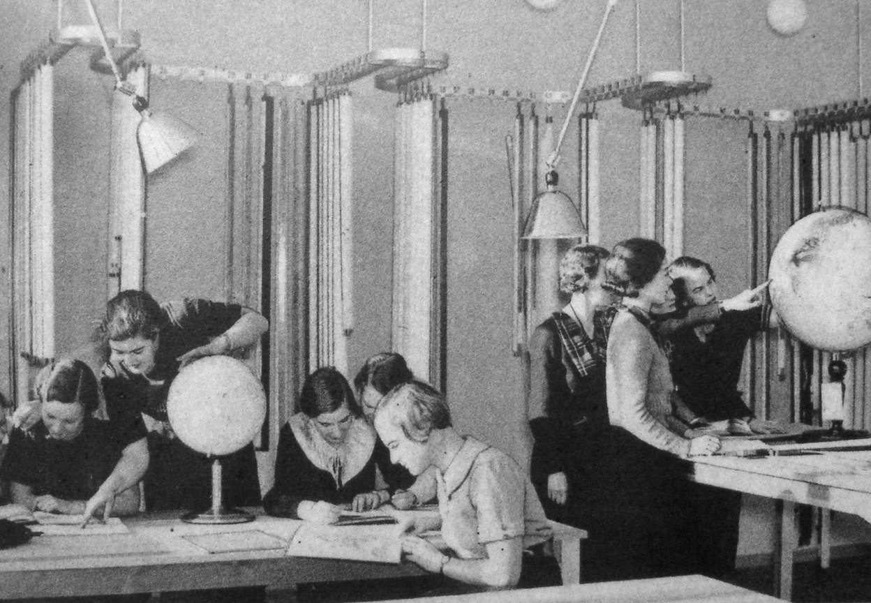 Geografiundervisning på Norrmalms flickläroverk 1936